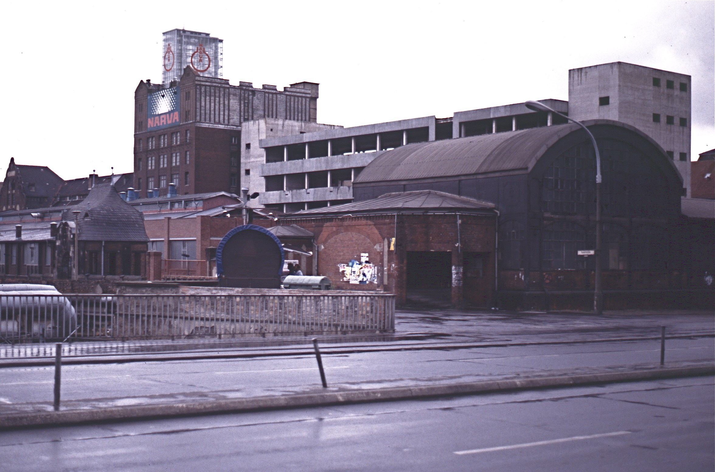 U-Bahnhof Warschauer Brücke in Berlin-Friedrichshain, Warschauer Straße